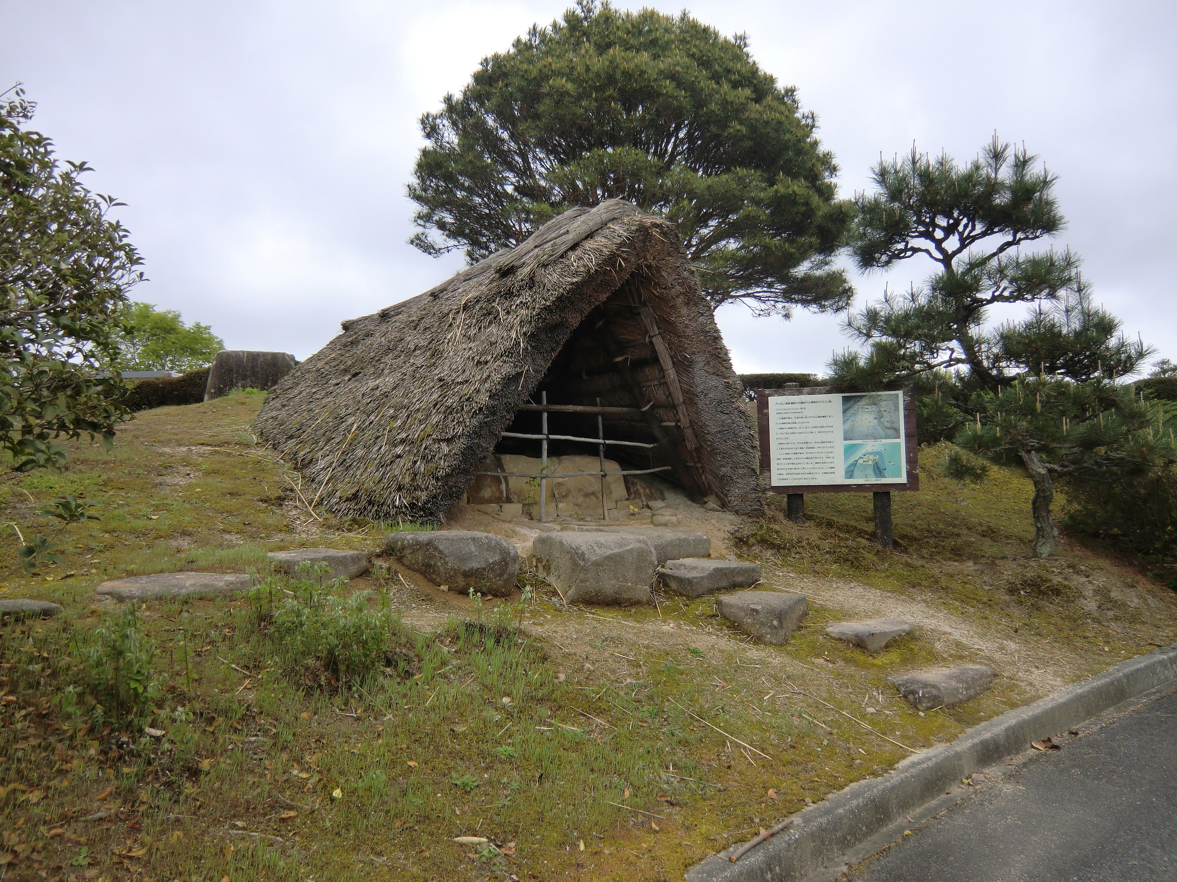 みよし風土記の丘内にある戸の丸山製鉄遺跡の復元（三次市）